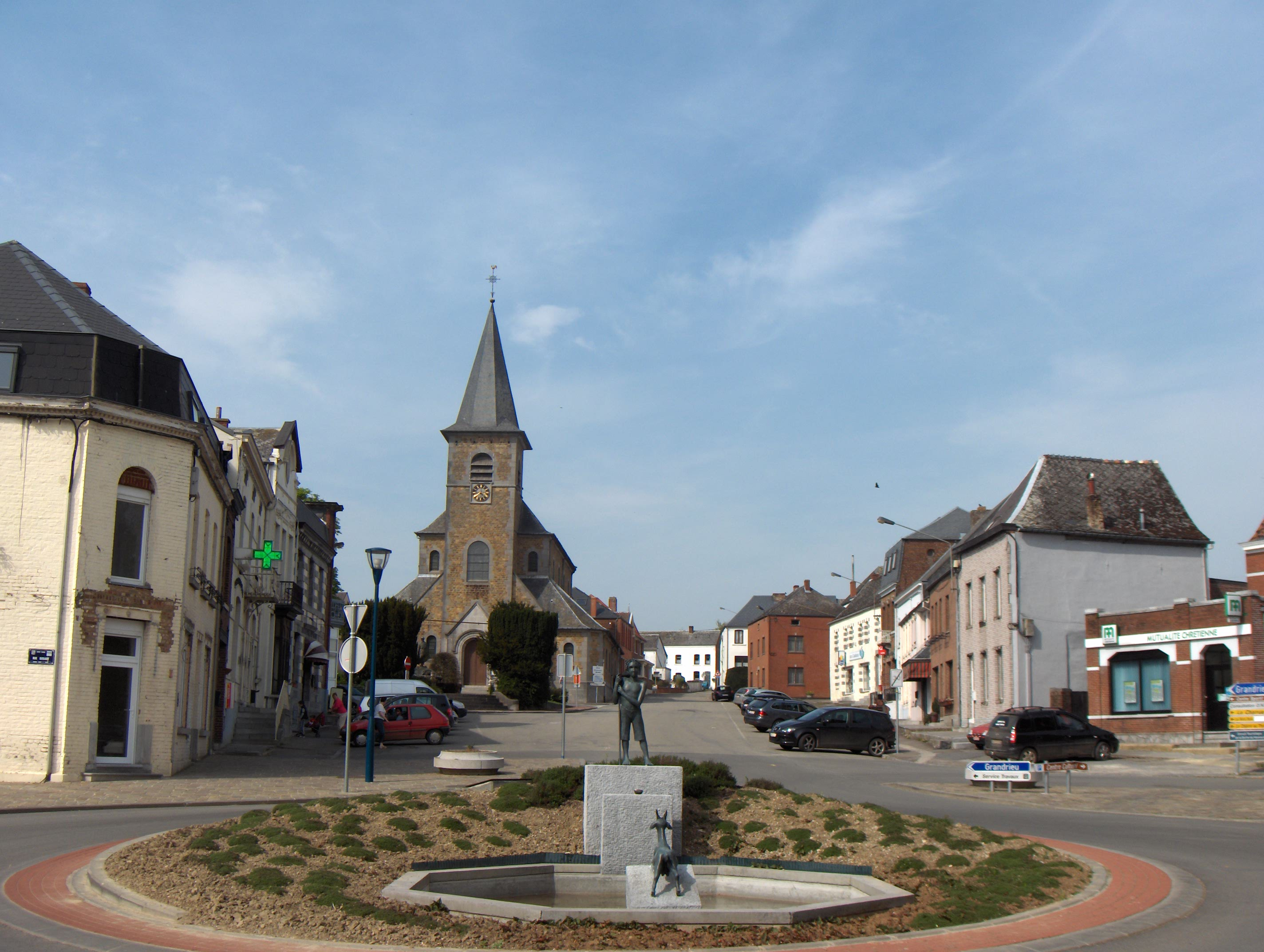 Sivry (commune de Sivry-Rance, prov. du Hainaut), Belgique: centre du village